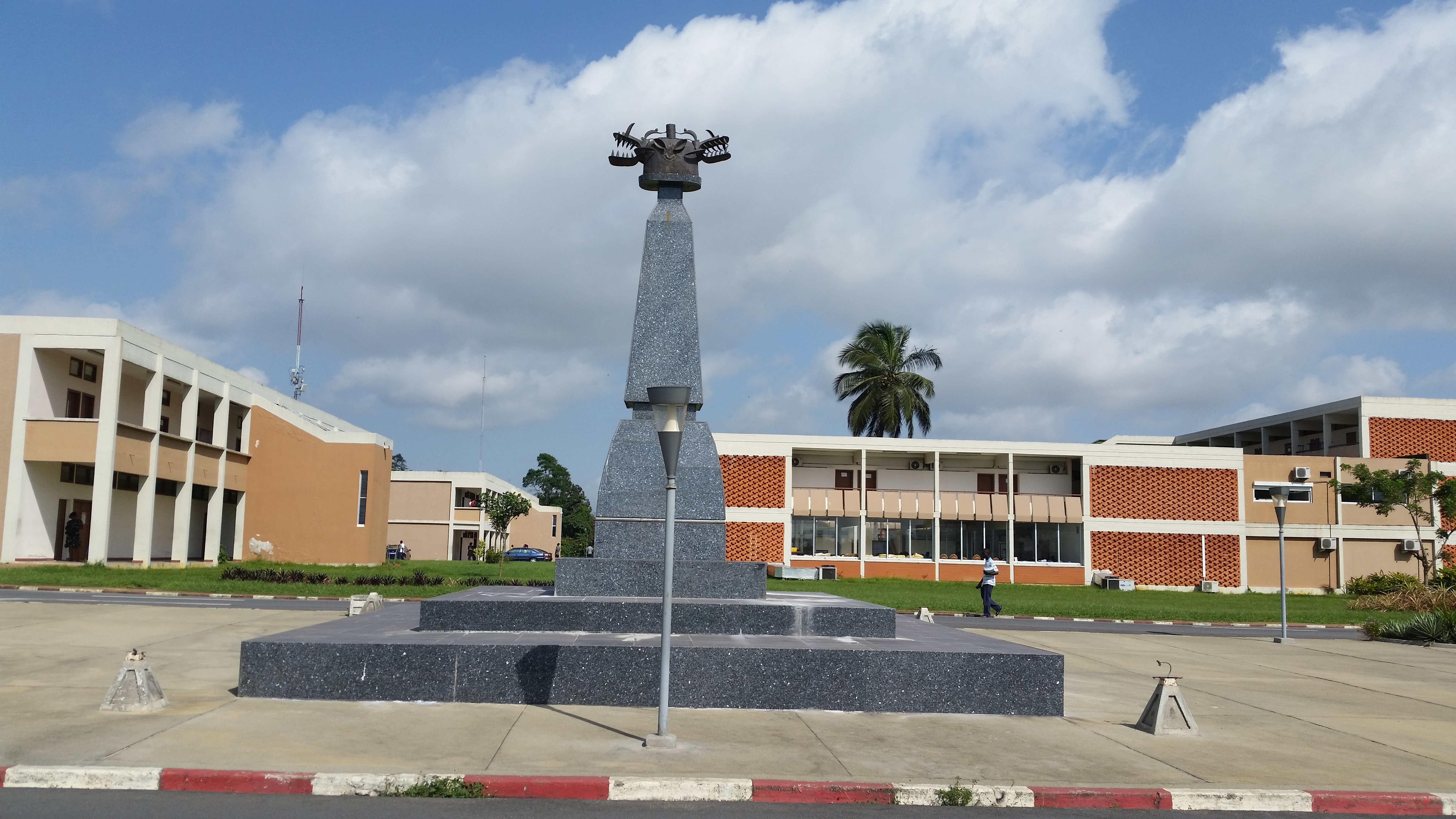 מבנה באוניברסיטת פליקס הופואה בואני בחוף השנהב